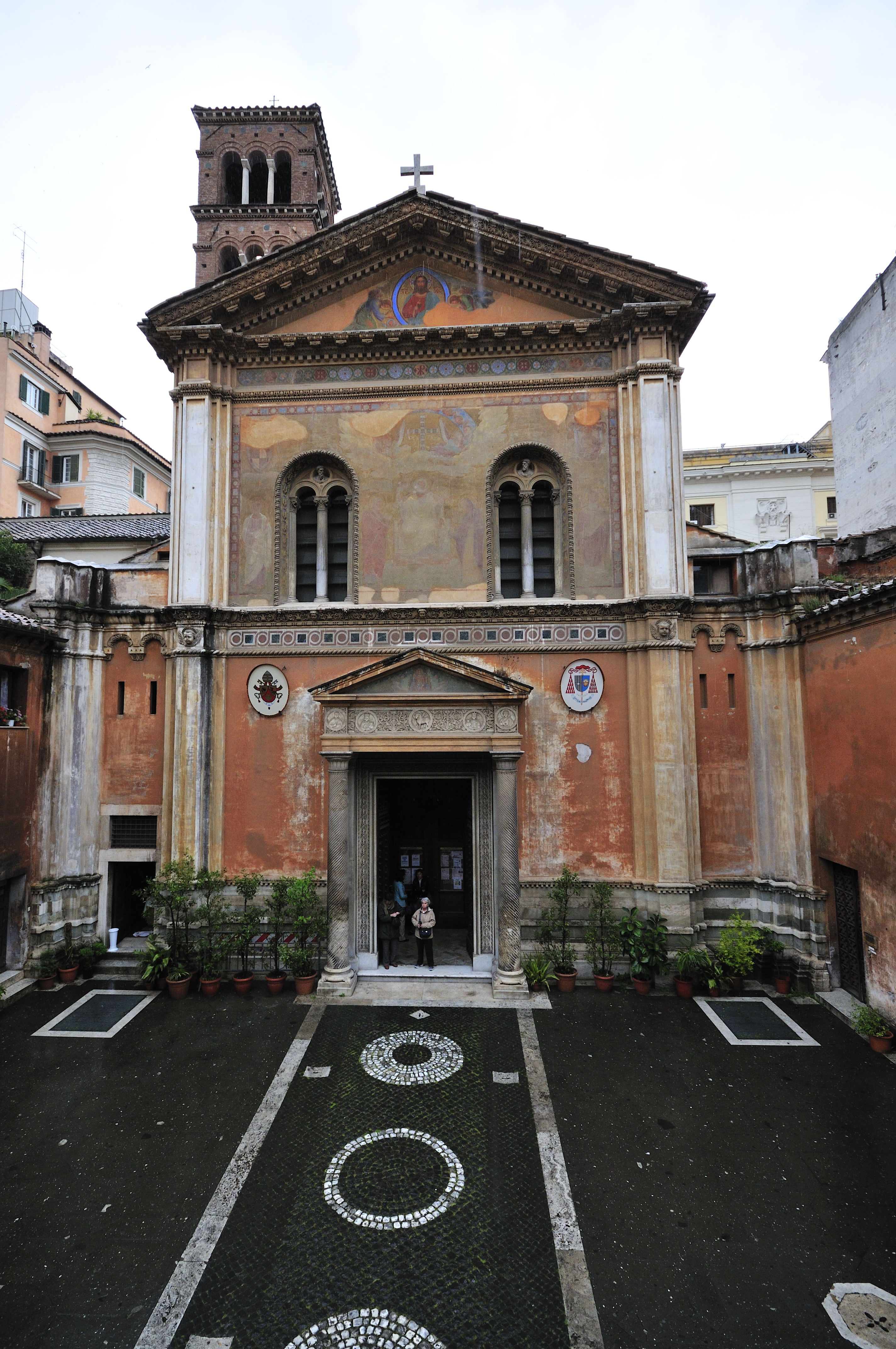 Basilica S. Pudenziana